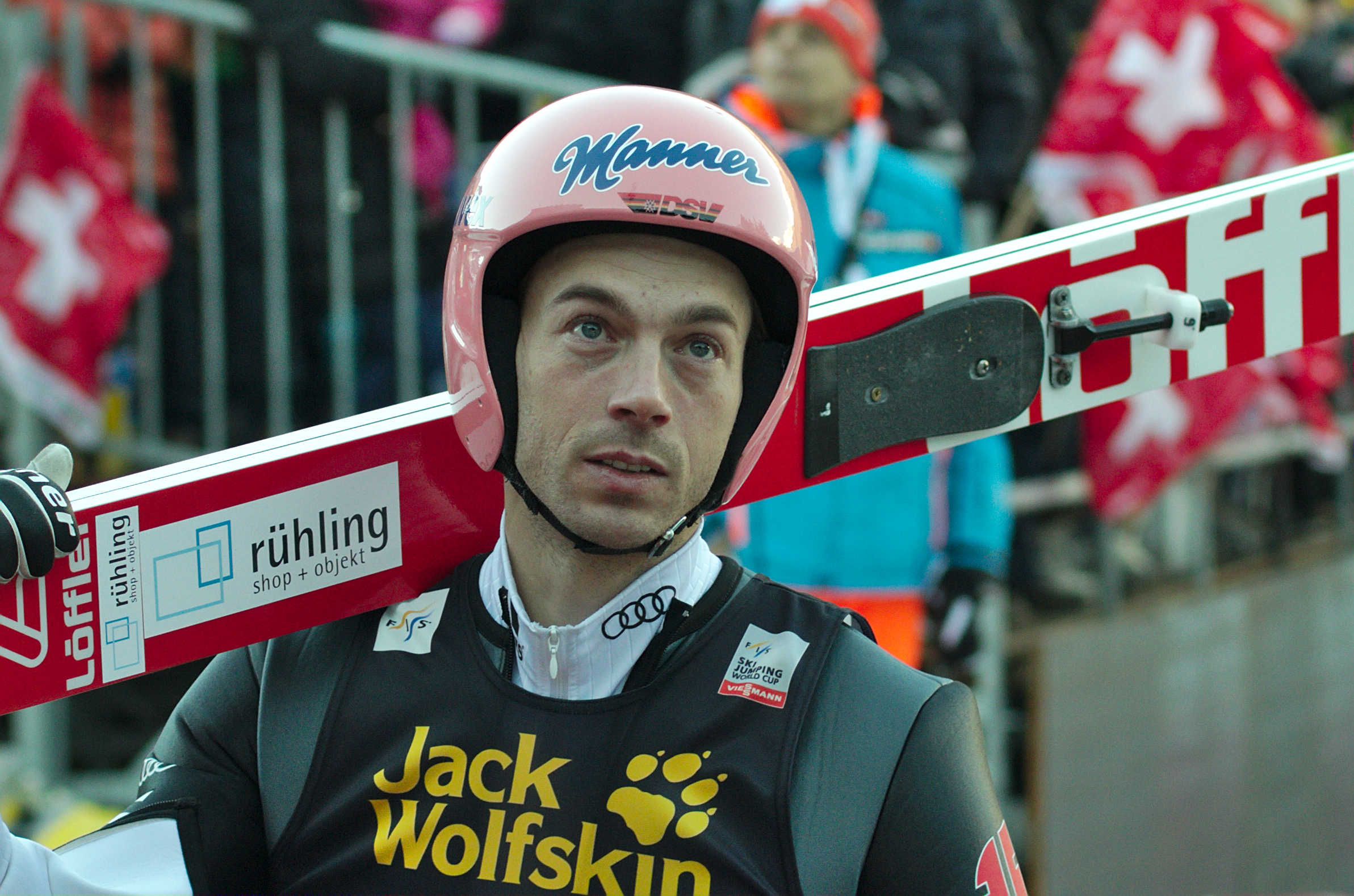 FIS Ski Jumping World Cup 2014 - Engelberg - 20141220 - Michael Neumayer